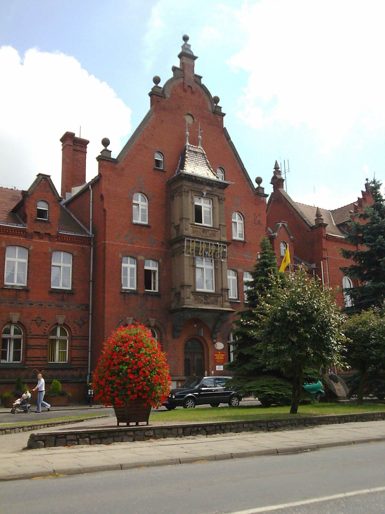 siedziba Rady Miasta przy ul. Gdańskiej